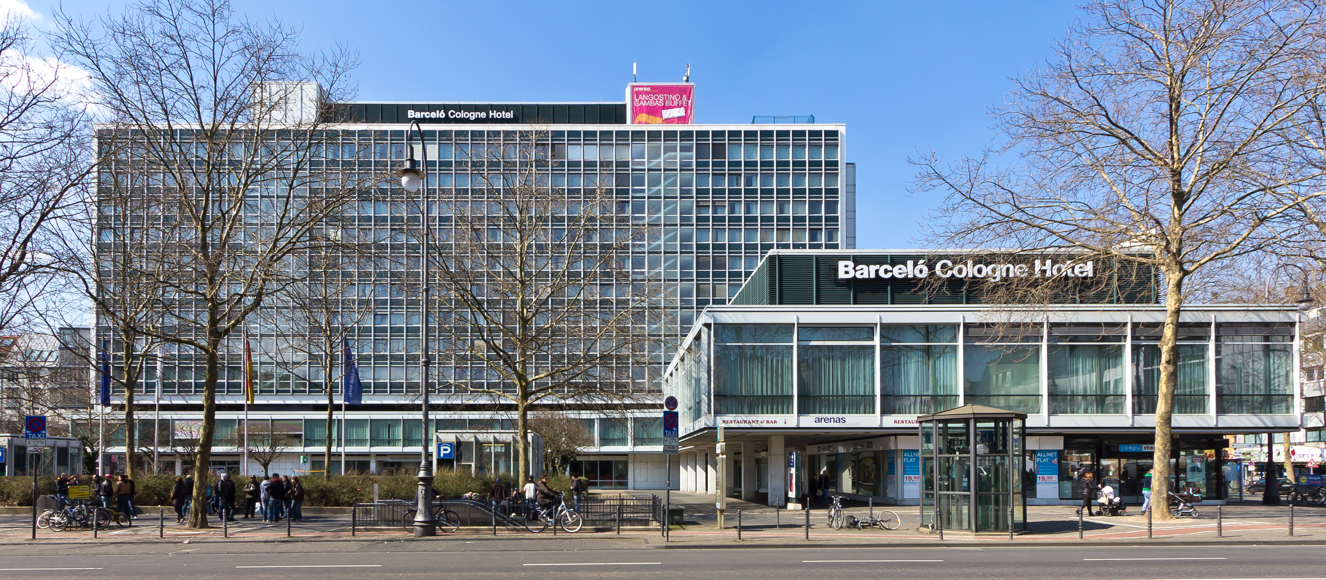 Barceló Cologne Hotel, denkmalgeschützt mit Ladeneinbauten (ehemaliges Holiday Inn), Habsburgerring 9–13